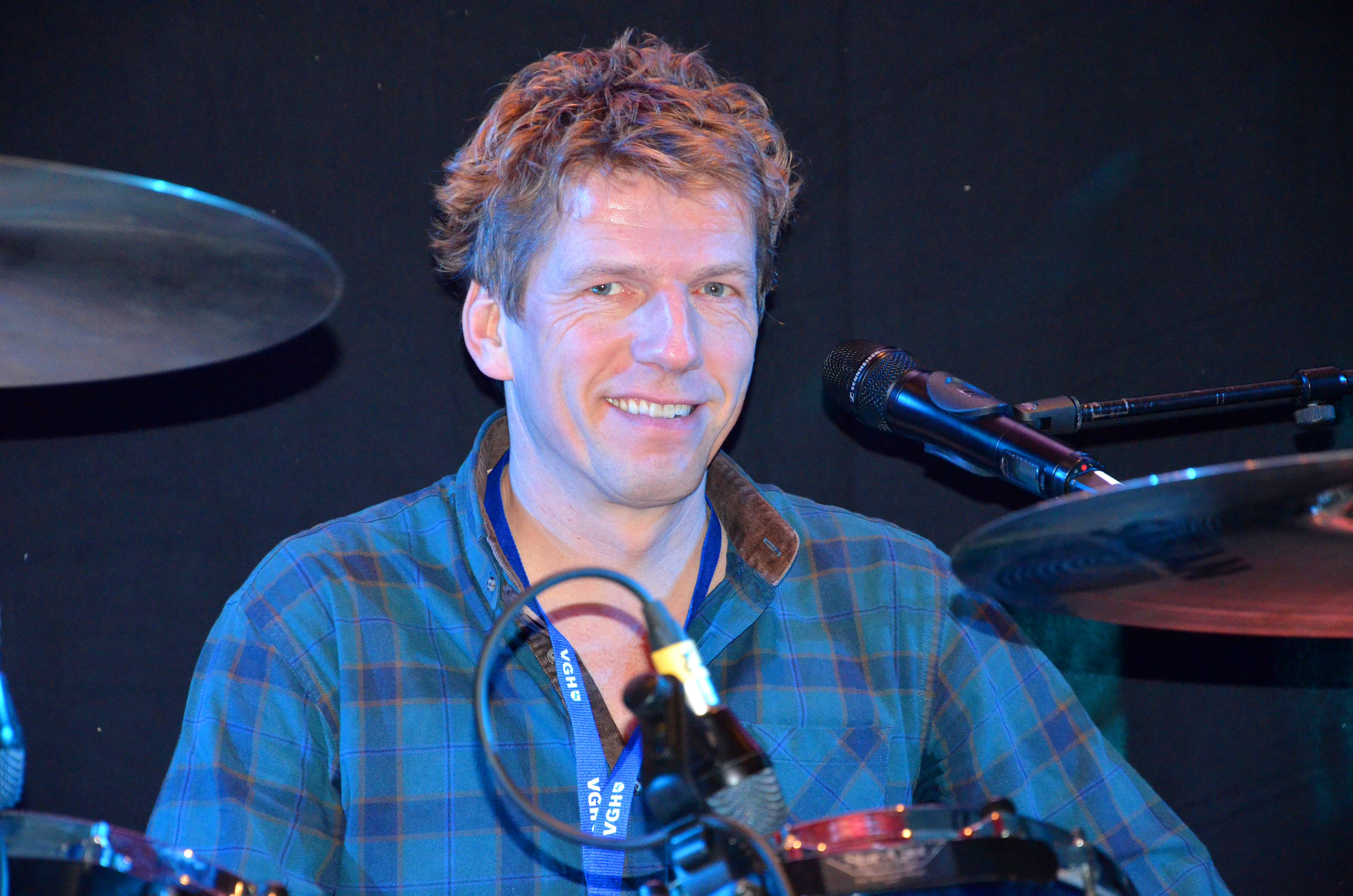 Gemeinsam mit anderen Mitgliedern der 2008 aufgelösten Rockband Fury in the Slaughterhouse sowie mit der "One-Man-Band" Kuersche spielte auch der Musiker Rainer Schumann, wie alle Künstler, ehrenamtlich vor den Gästen des Festes Die!!! Weihnachtsfeier für Obdachlose und Bedürftige in Hannover ...